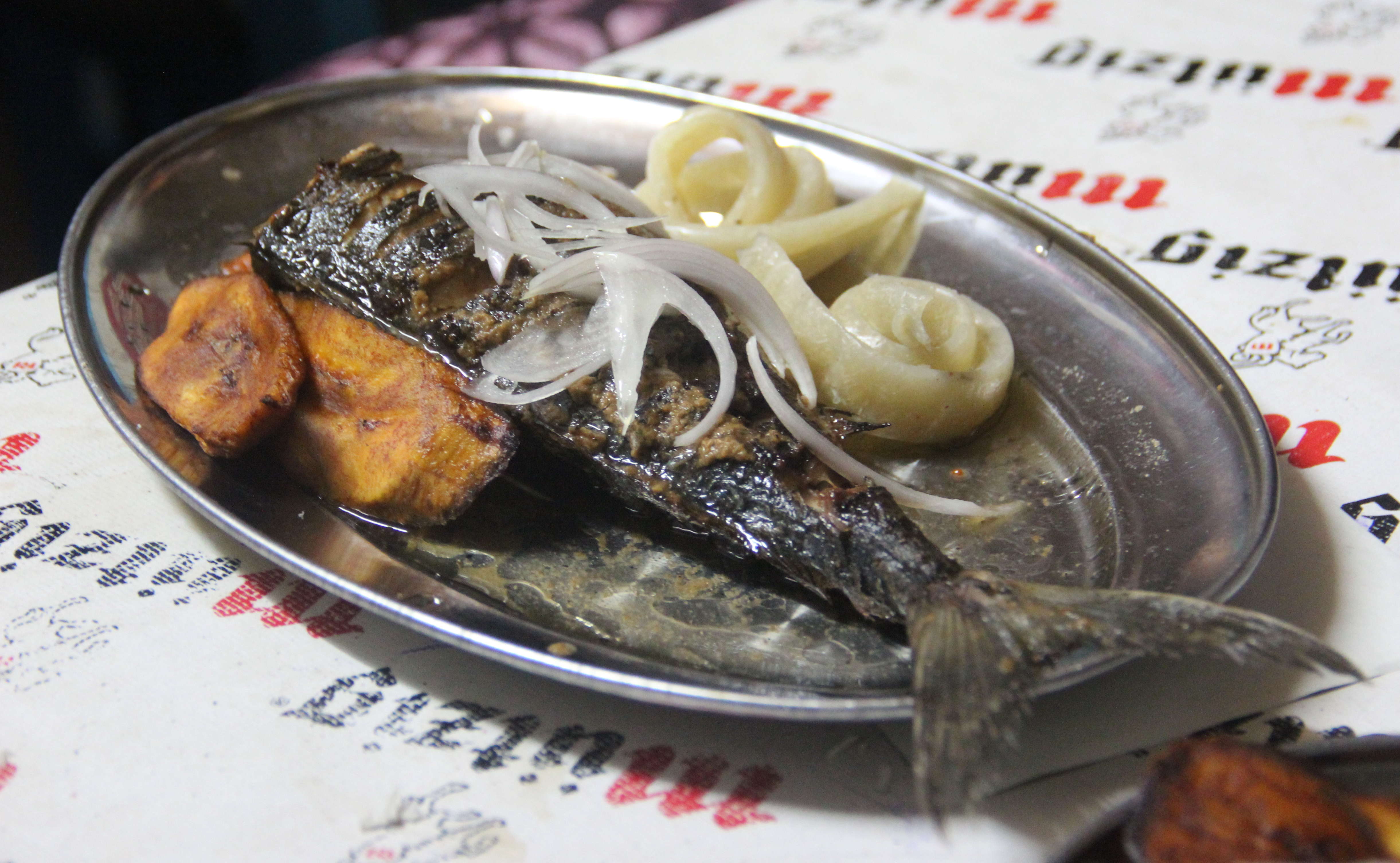 Plat de poisson braisé (maquereau ?) avec des frites de plantain, du miondo (manioc) et des oignons. Douala, Cameroun.